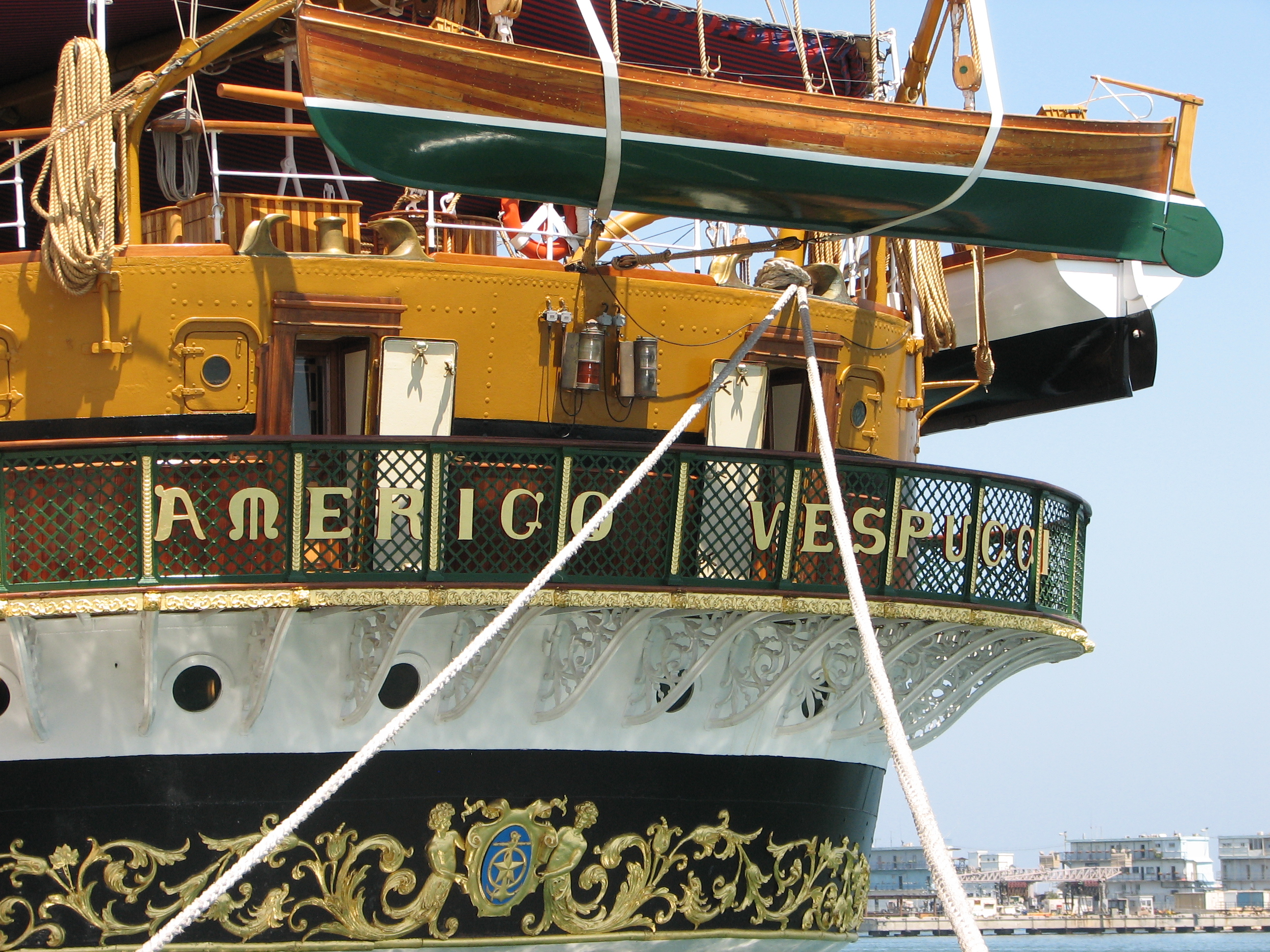 The Amerigo Vespucci is a tall ship of the Marina Militare, named after the explorer Amerigo Vespucci. Its home port is Livorno, Italy; It is still in use as a school ship. Visit Haifa port' Israel from 26/7/2011 - 28/7/2011 ספינת המפרשים "אמריגו וספוצ'י" הספינה ששייכת לצי האיטלקי מפליגה עשרות ימים בשנה ומשמשת את חיל הים האיטלקי כספינת קדטים. הספינה הגיעה לנמל חיפה ב- 26 ביולי 2011 והיא צפויה לשהות בנמל חיפה עד ליום חמישי 28 ביולי 2011, כחלק ממסע הפלגות הכולל גם את איסטנבול, אודסה ואתונה